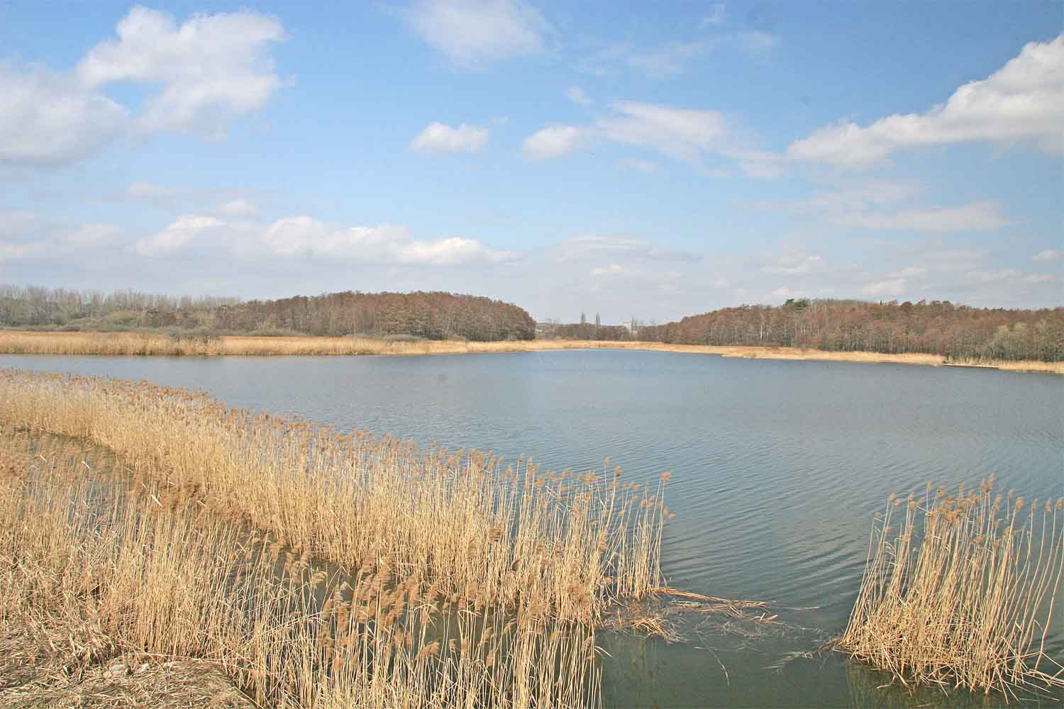 NPR Bohdanečský rybník a rybník Matka